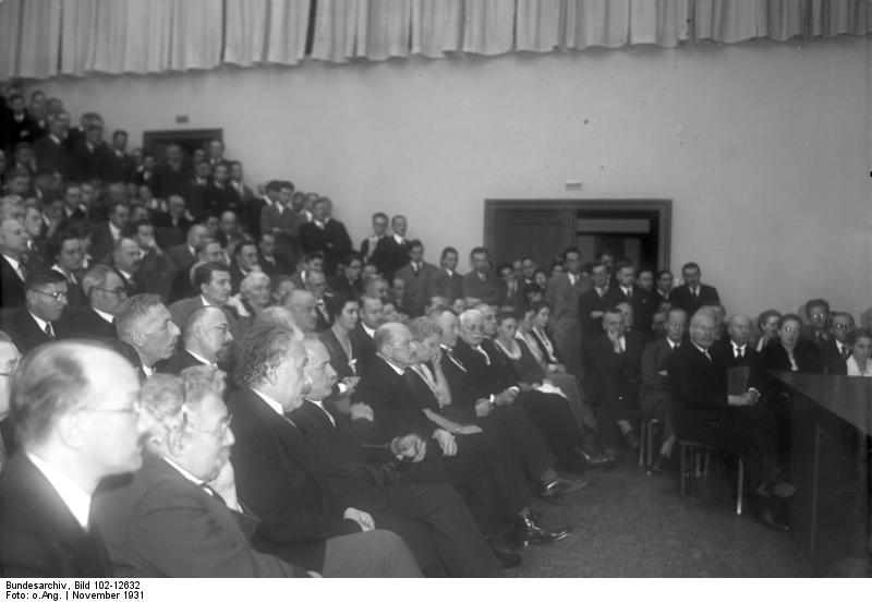 Der hervorragende amerikanische Nobelpreisträger für Physik Prof. Millicam spricht vor deutschen Gelehrten ! Prominente Gäste bei dem Vortrag des amerikanischen Nobelpreisträgers Prof. Millicam. Der Zweite vorn links Prof. Albert Einstein, daneben der Präsident der Kaiser-Wilhelm-Gesellschaft Prof. Planck. corrected 2013-08-01: Max Planck sitzt nicht direkt neben Albert Einstein, sondern zwei bzw. drei Sitze rechts von Einstein (siehe Bild-Annotation)